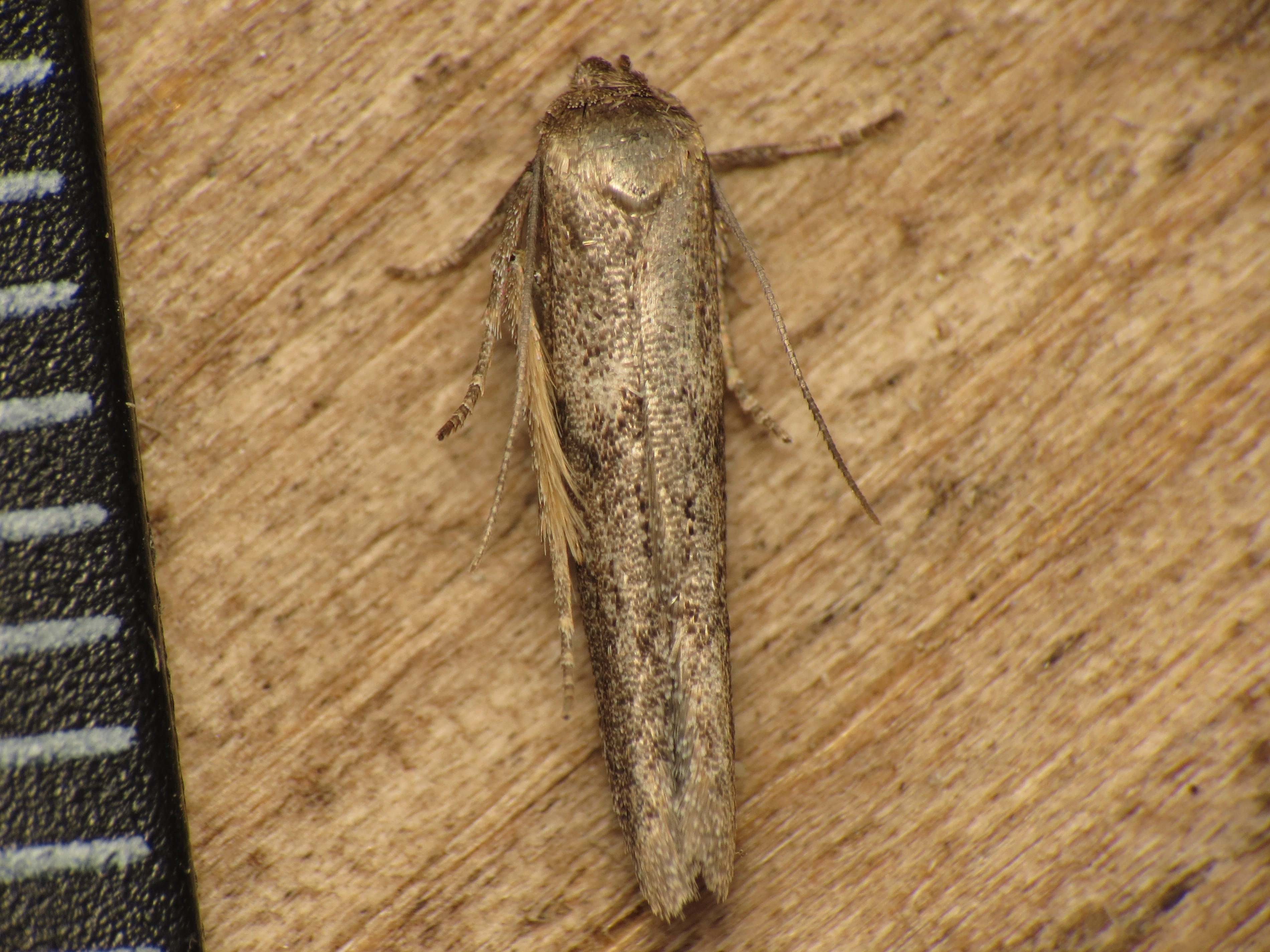 Blastobasis phycidella (Zeller, 1839), Roda de Barà, Spain, 21 May 2013